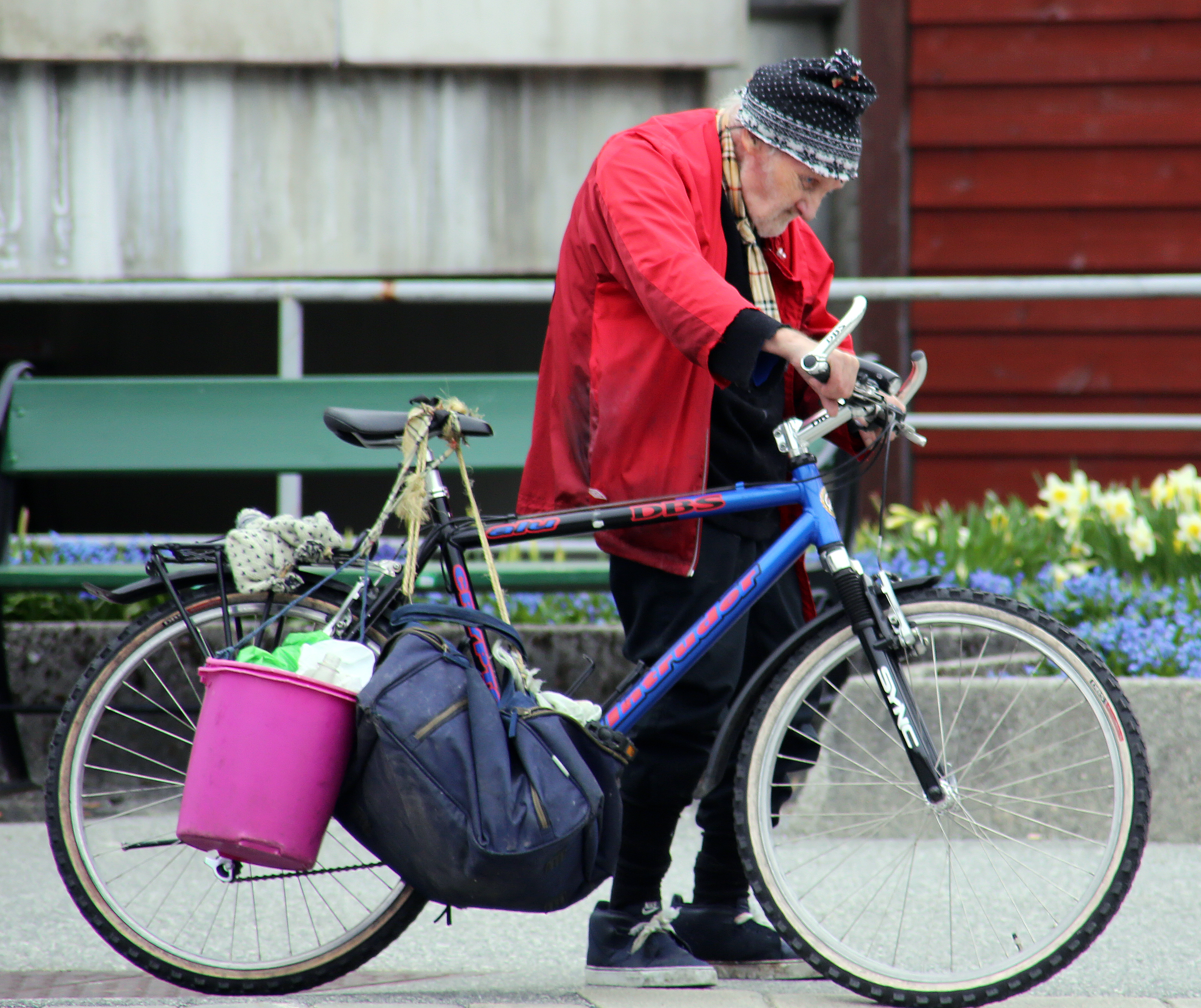 Otto Fredrik Wollertsen in Bergen, Norway